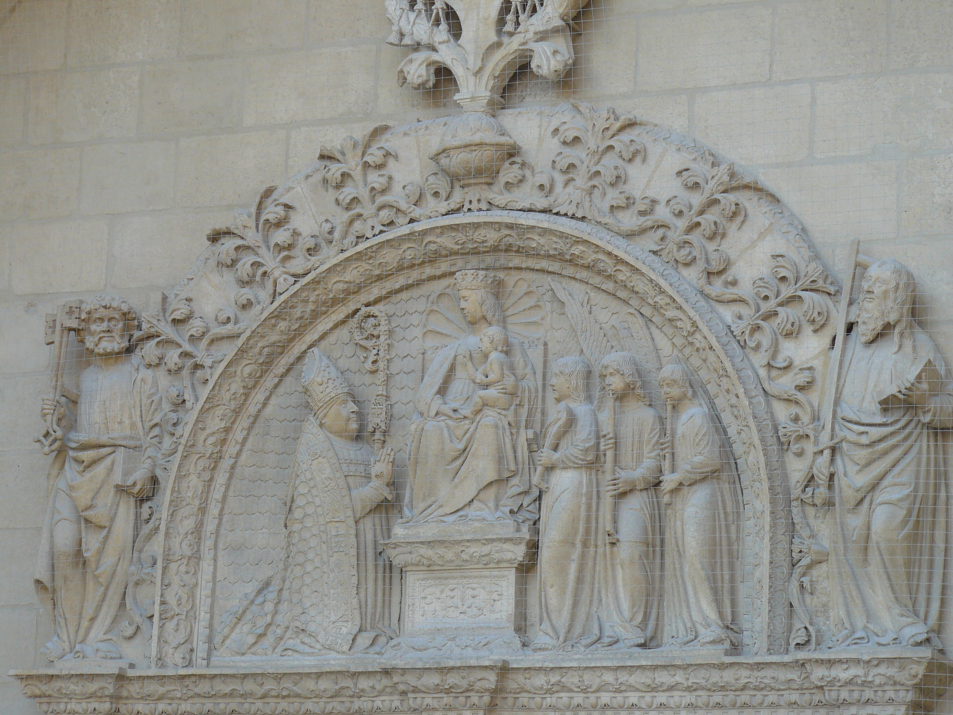 Catedral de Burgos, Burgos.